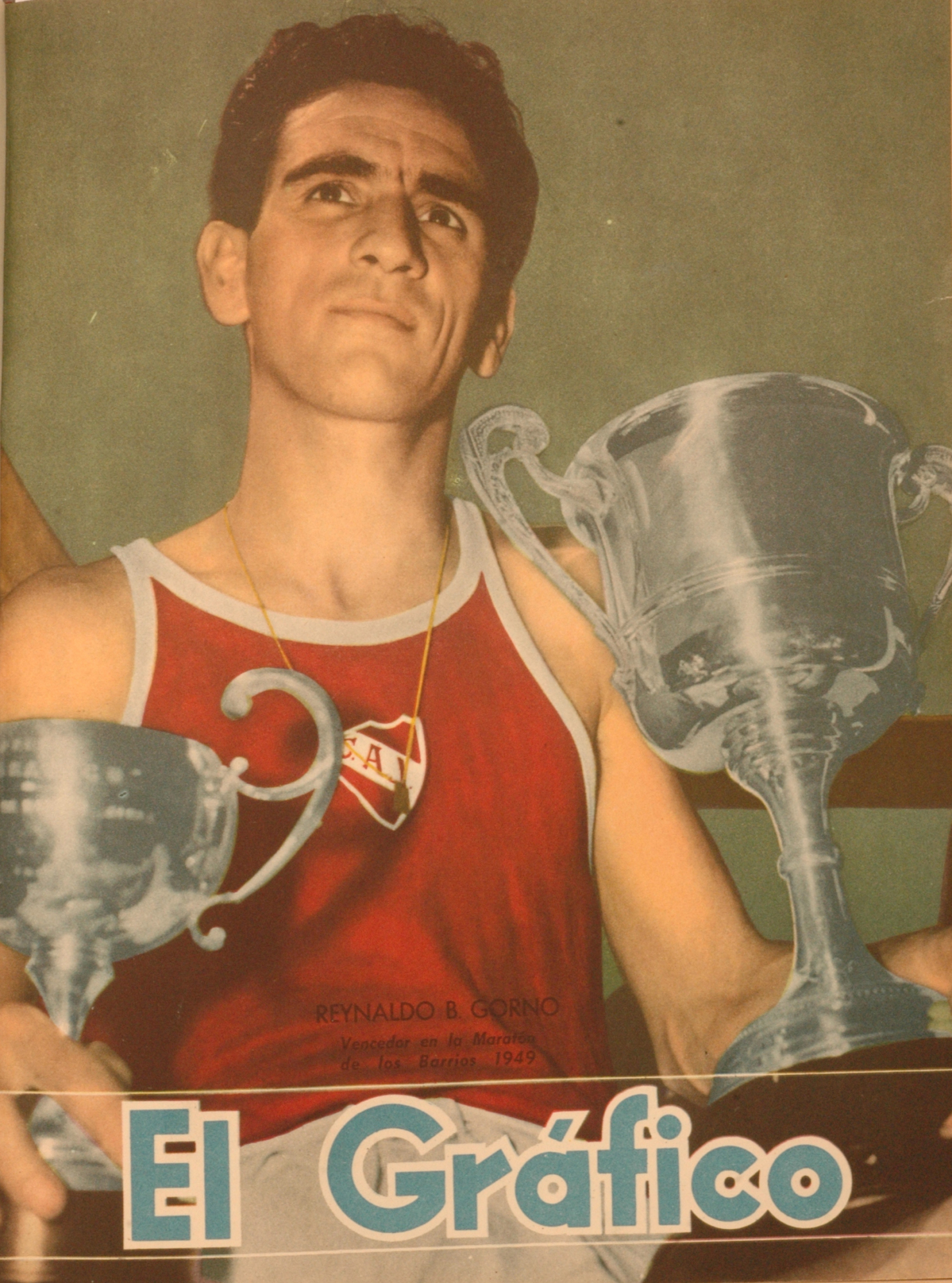 El Grafico del 23 de Diciembre de 1949. Edicion 1585